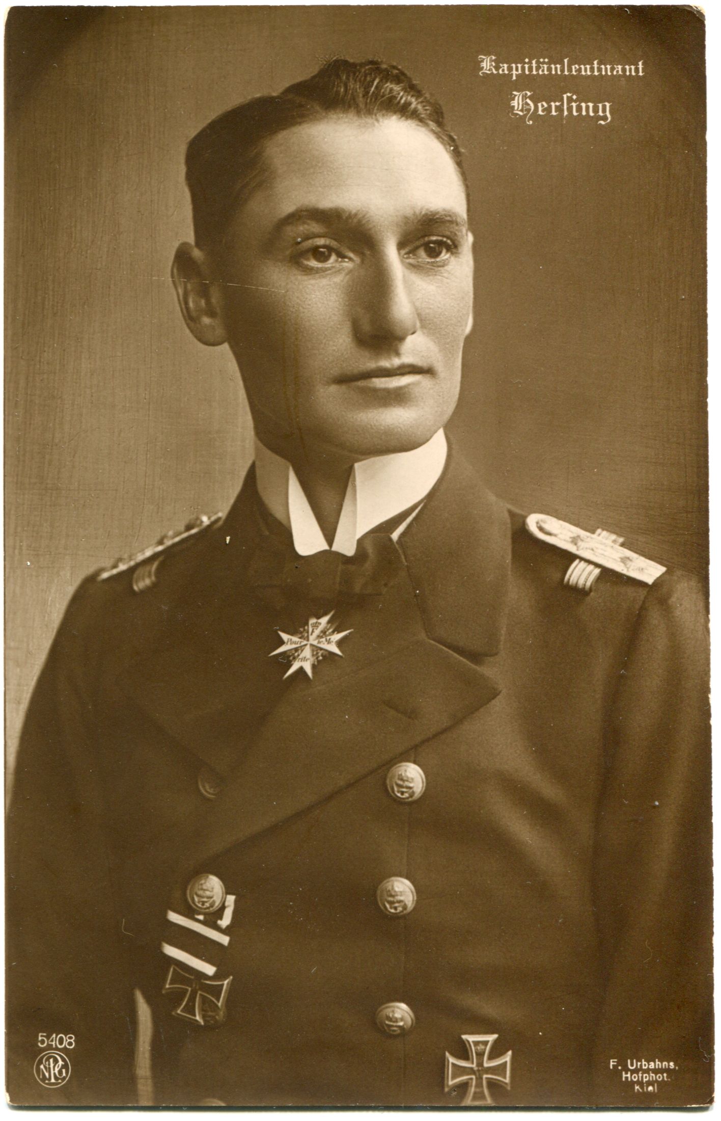 Почтовая открытка. Капитан-лейтенант Херзинг, фотография